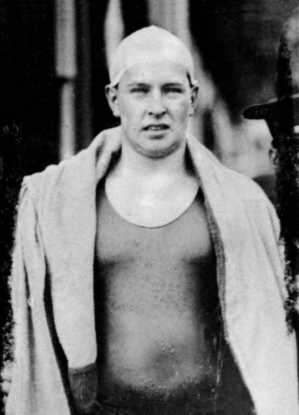 George Vernot